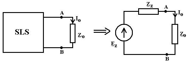 Ilustracja twierdzenia Thevenina w ujęciu symbolicznym.